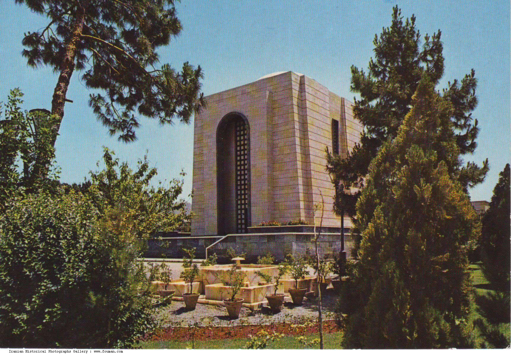 Mausoleum of Reza Shah